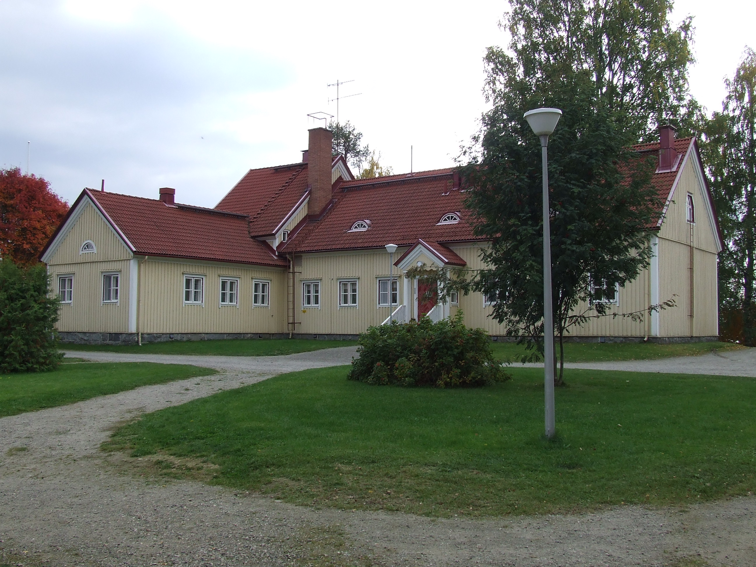 Itä-Suomen yliopiston Mekrijärven tutkimusaseman päärakennus Ilomantsissa. Rakennus on toiminut aiemmin kansakouluna.